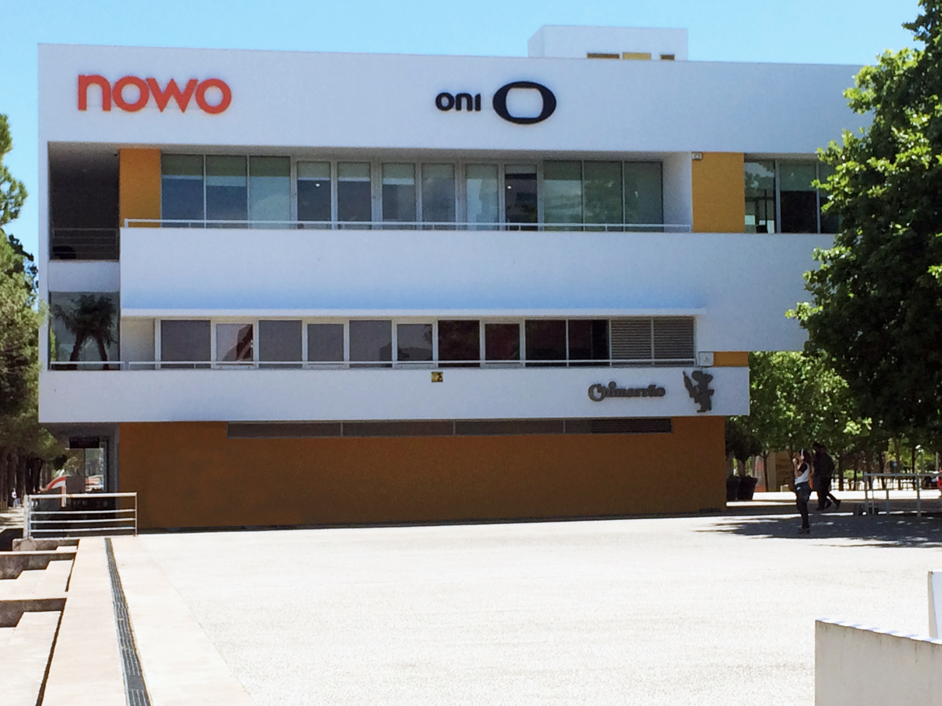 Sede Oni Telecom Parque das Nações